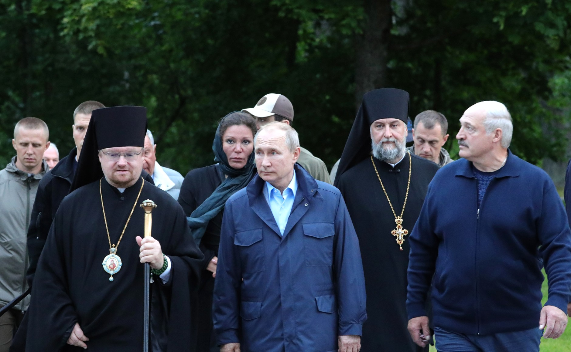 Владимир Путин и Президент Республики Беларусь Александр Лукашенко посетили Коневский Рождество-Богородичный монастырь